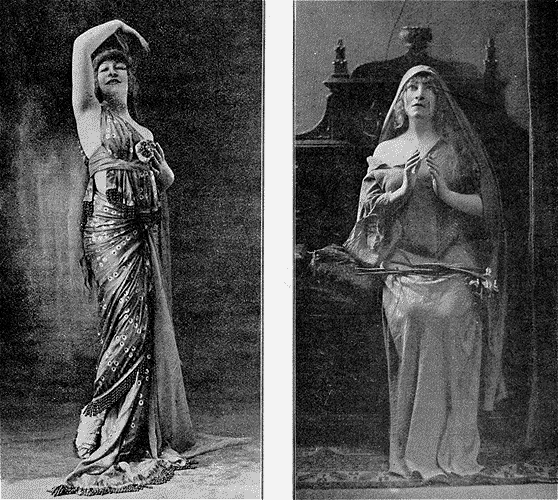 L'Illustration